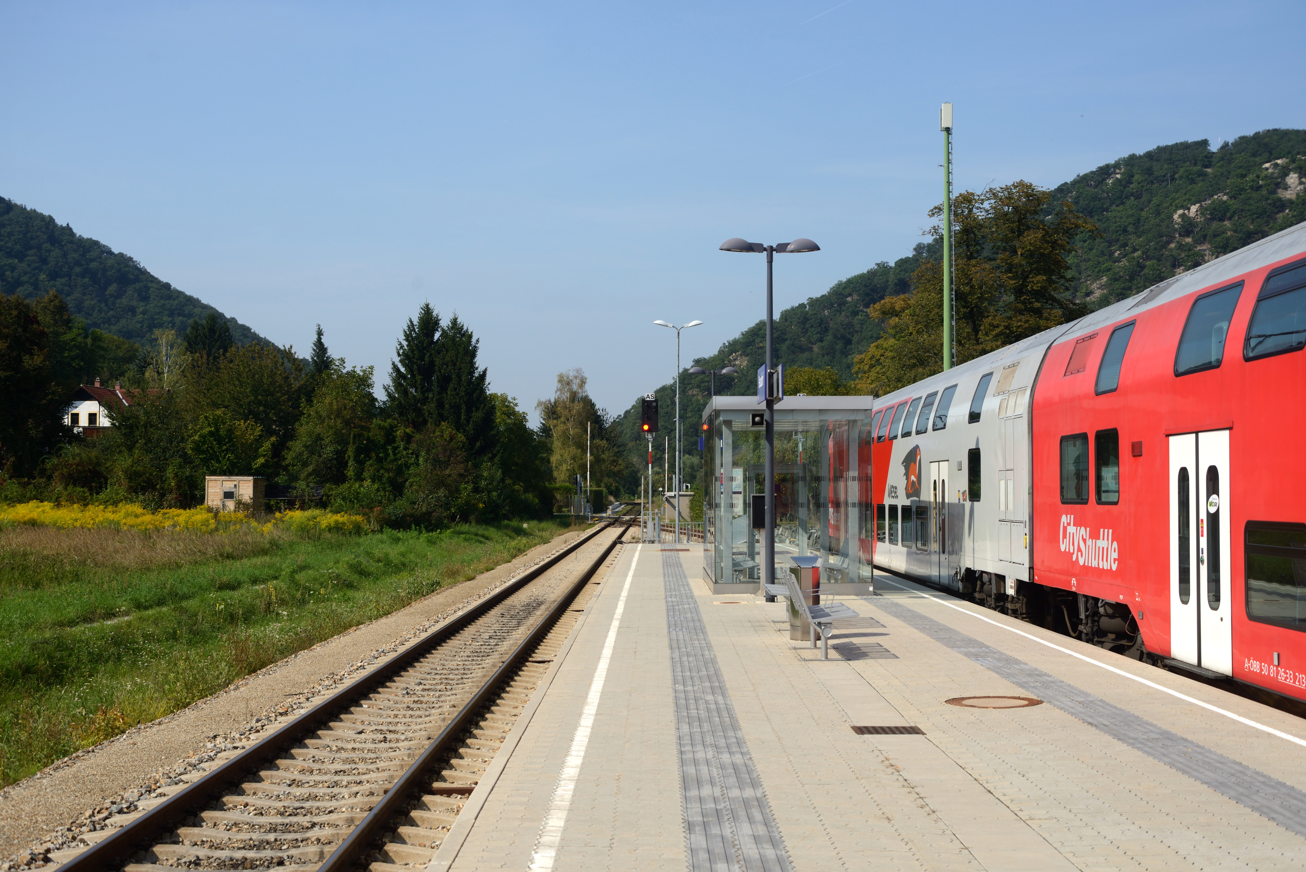 Bahnsteig am Bahnhof Paudorf, Blickrichtung Krems